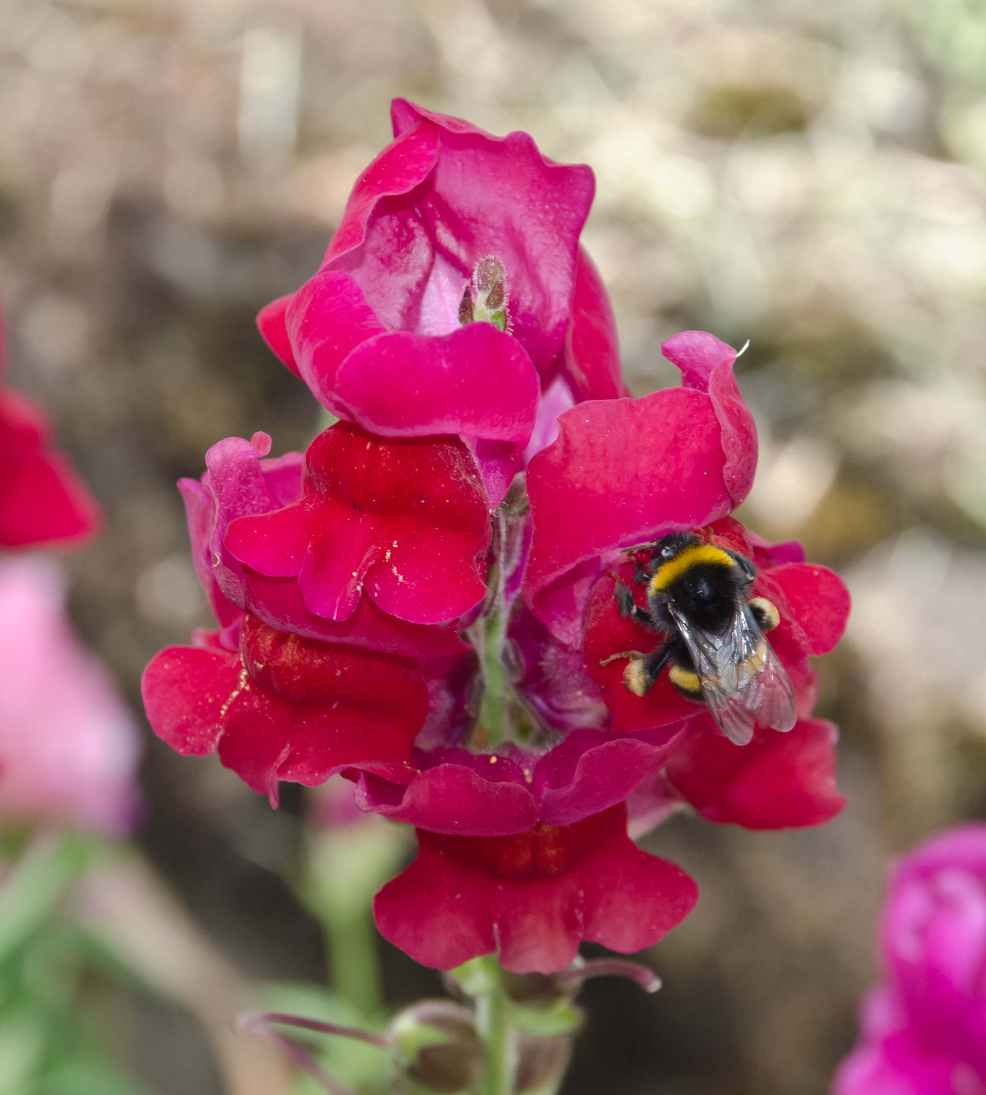 Kwiat lwiej paszczy